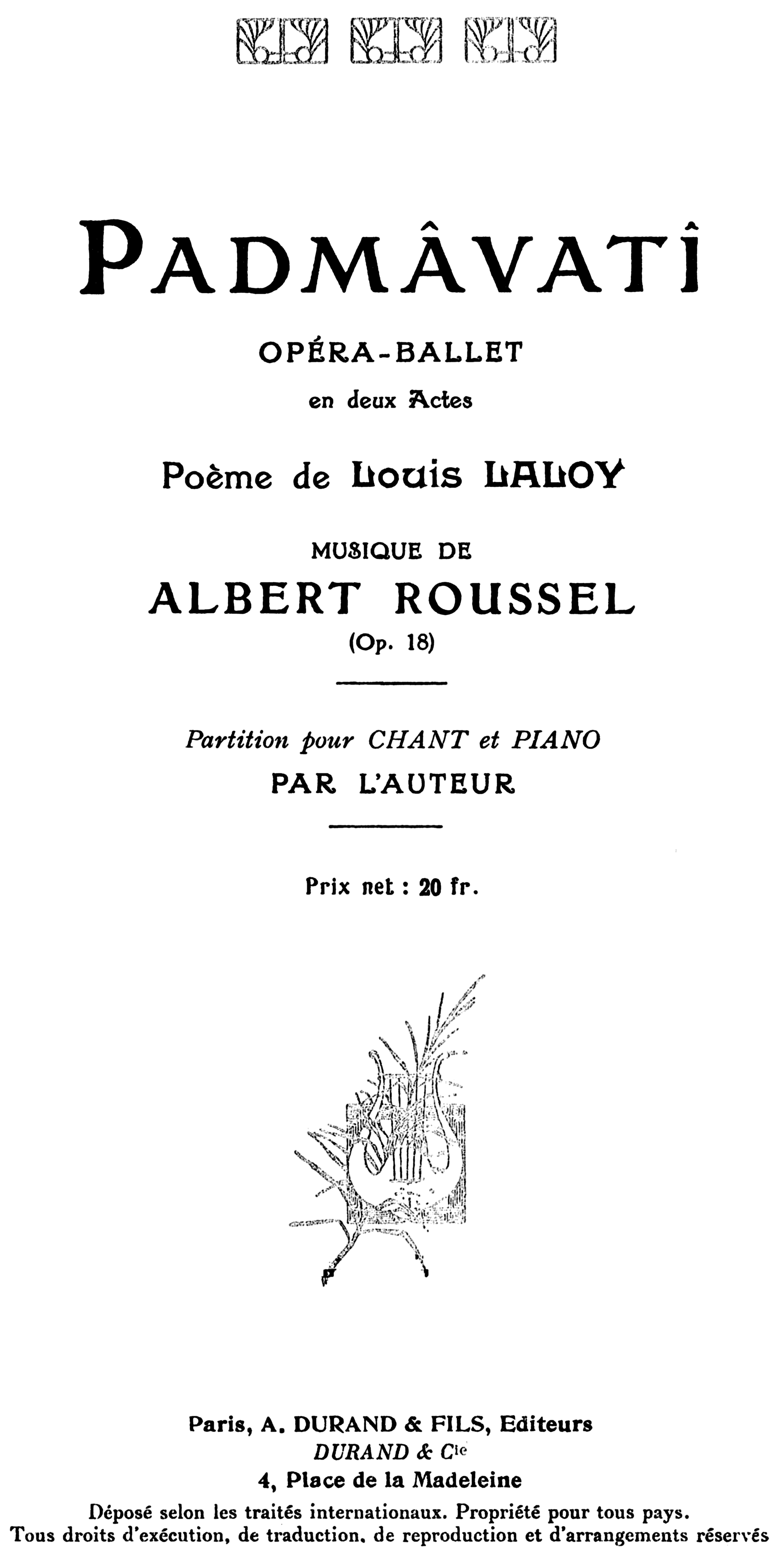 Roussel - Padmâvatî - Piano score, Paris 1919 - Title page